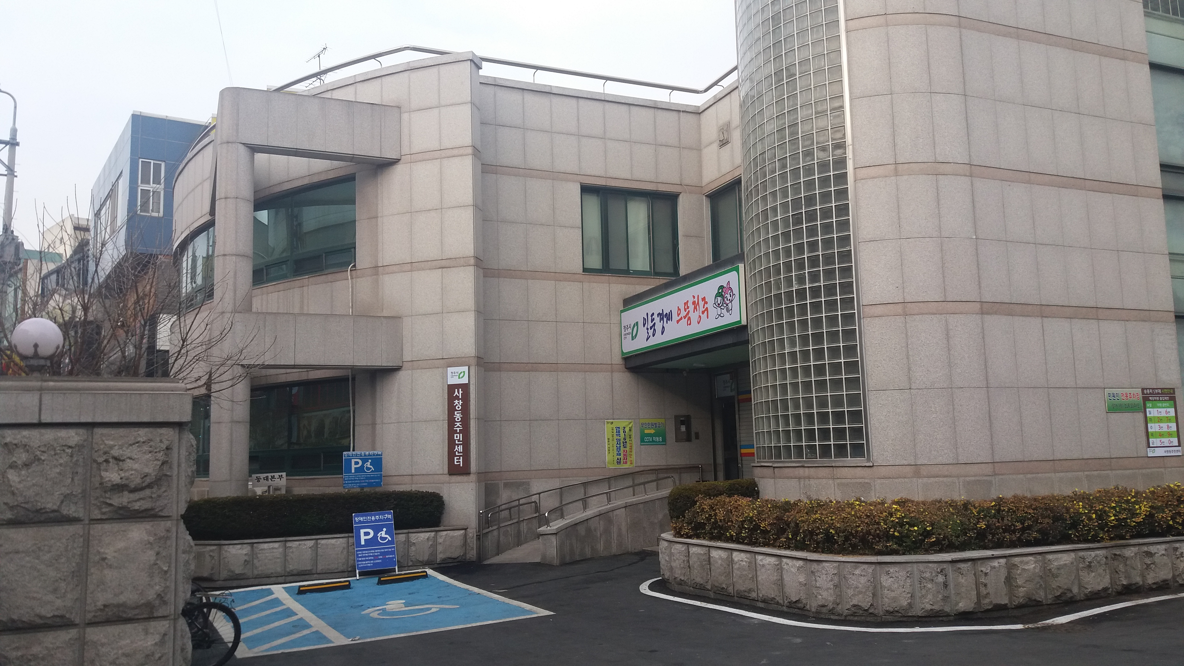 청주 사창동사무소